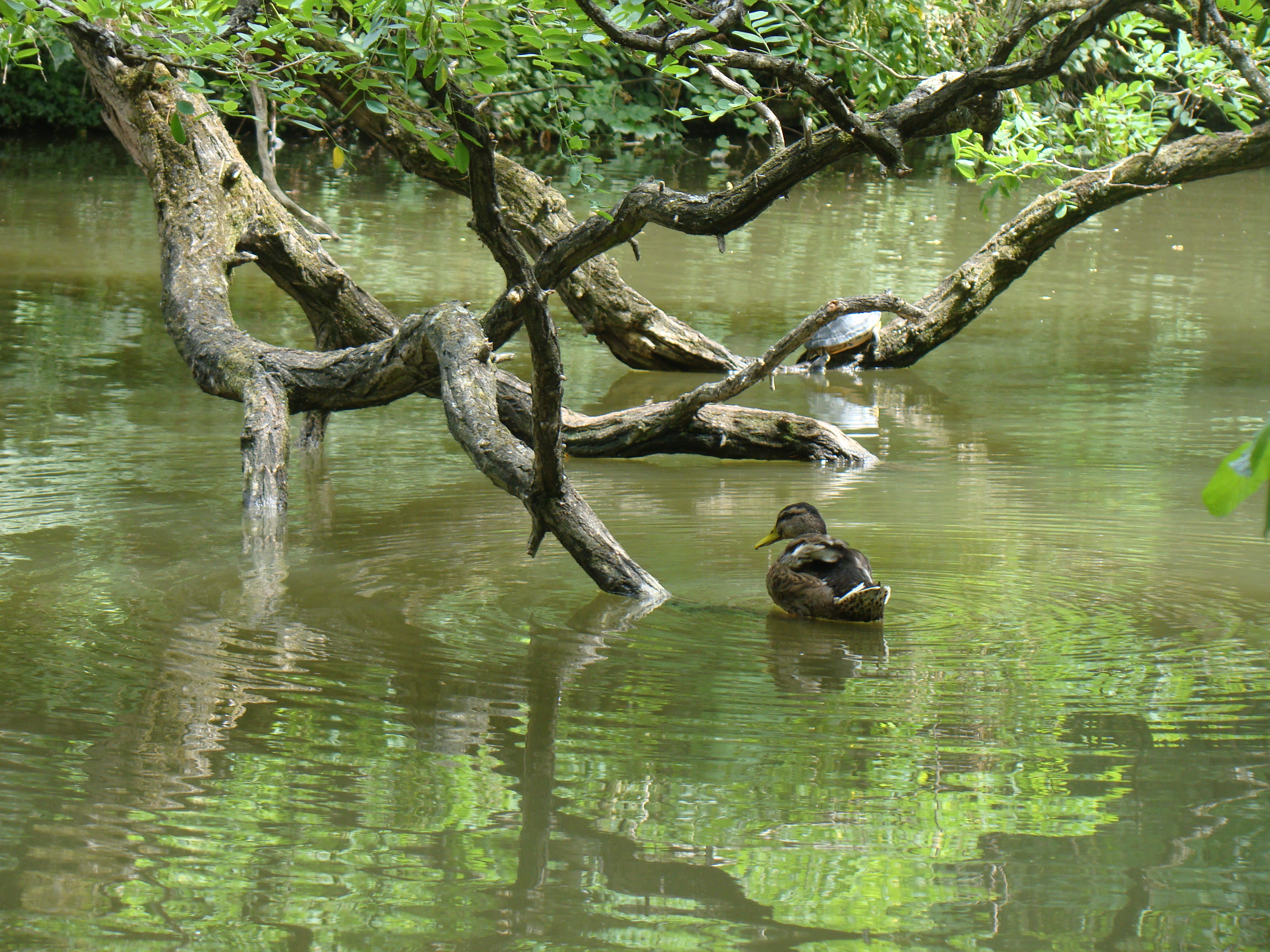 Lago des MInimes Paris